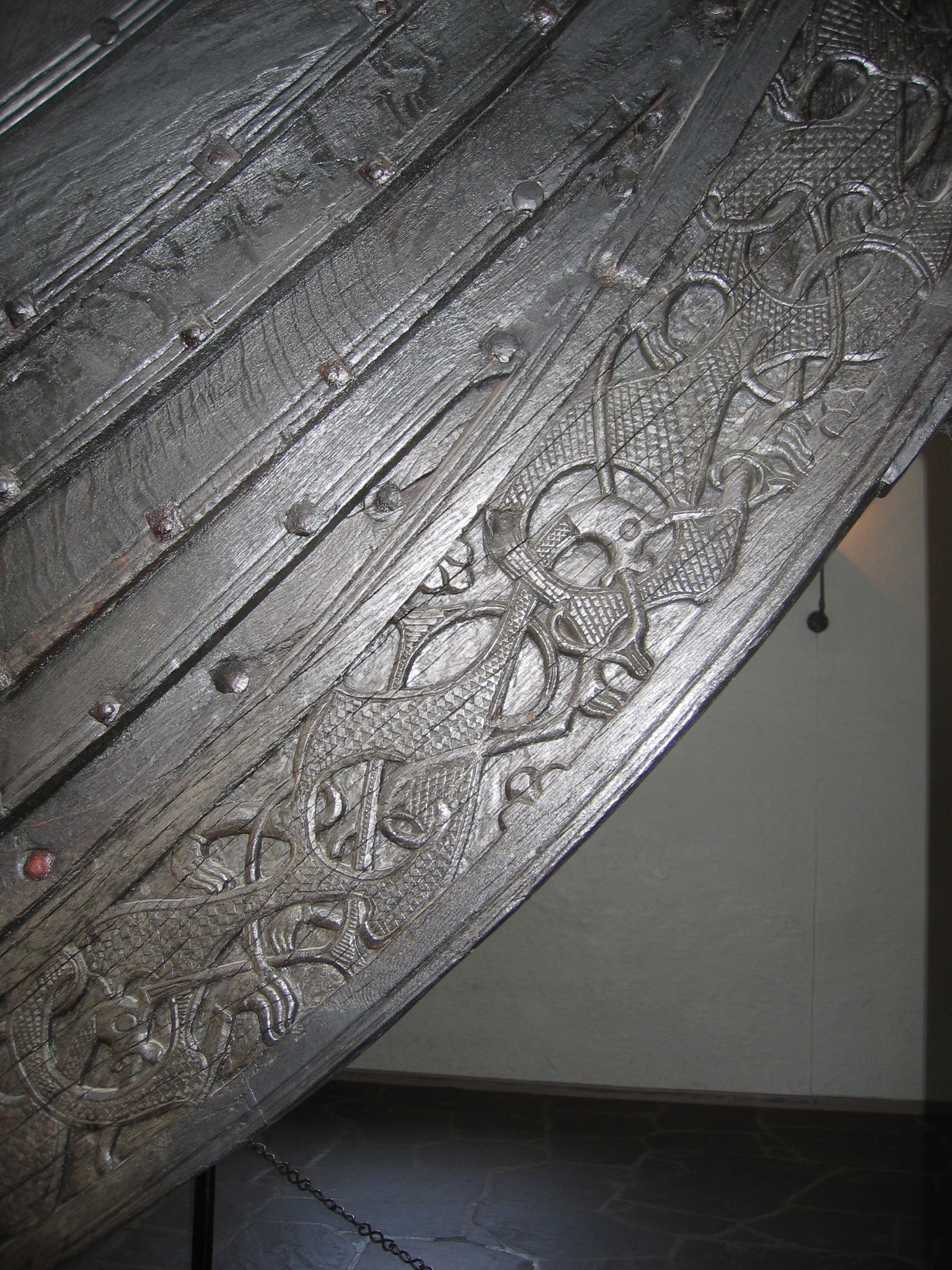 Detail from Osebergskipet, Vikingskipmuseet, Oslo